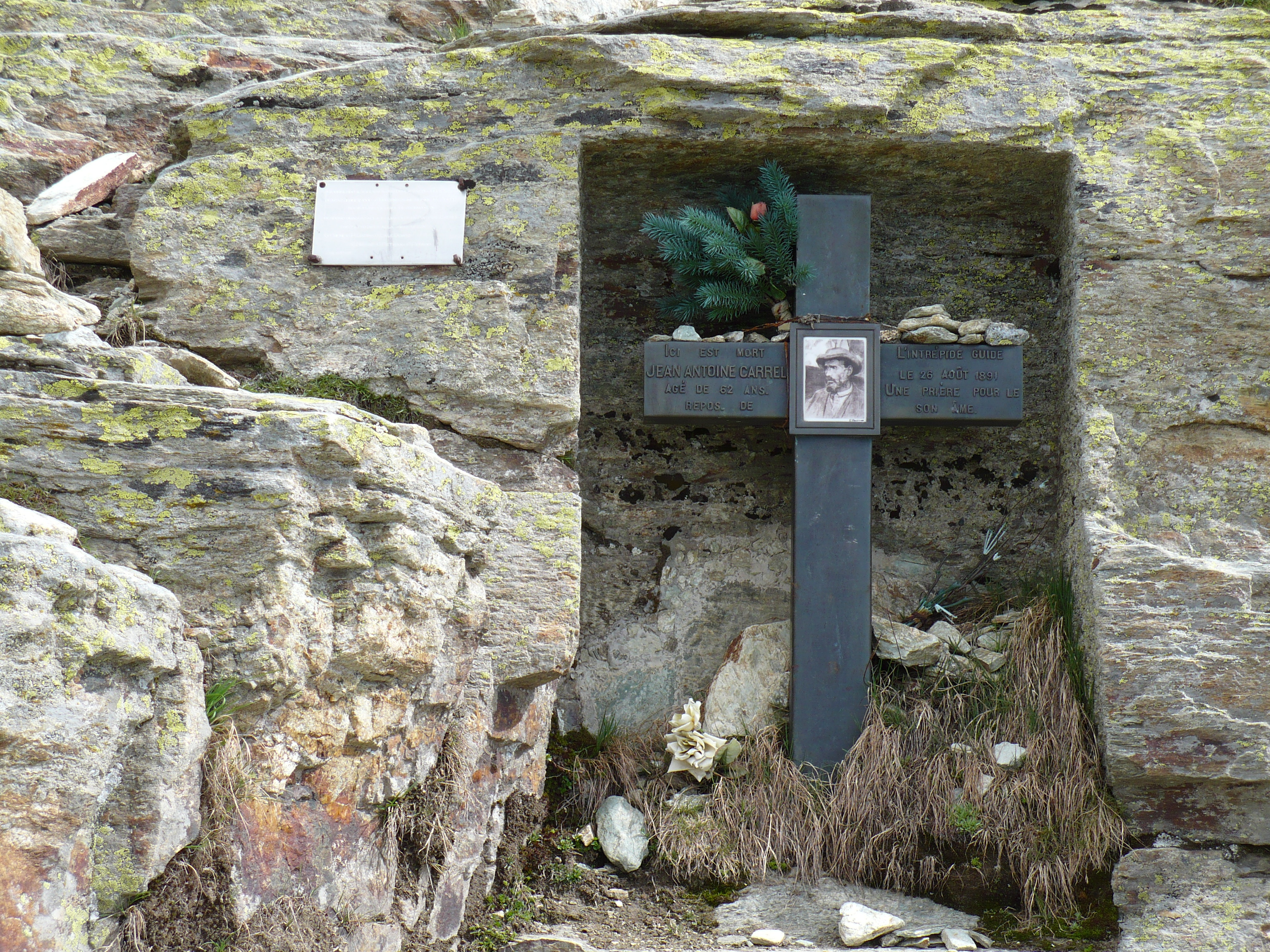 Croce Carrel Alta Valsavarenche (Valle d'Aosta - Italia) in ricordo dell'alpinista Jean-Antoine Carrel